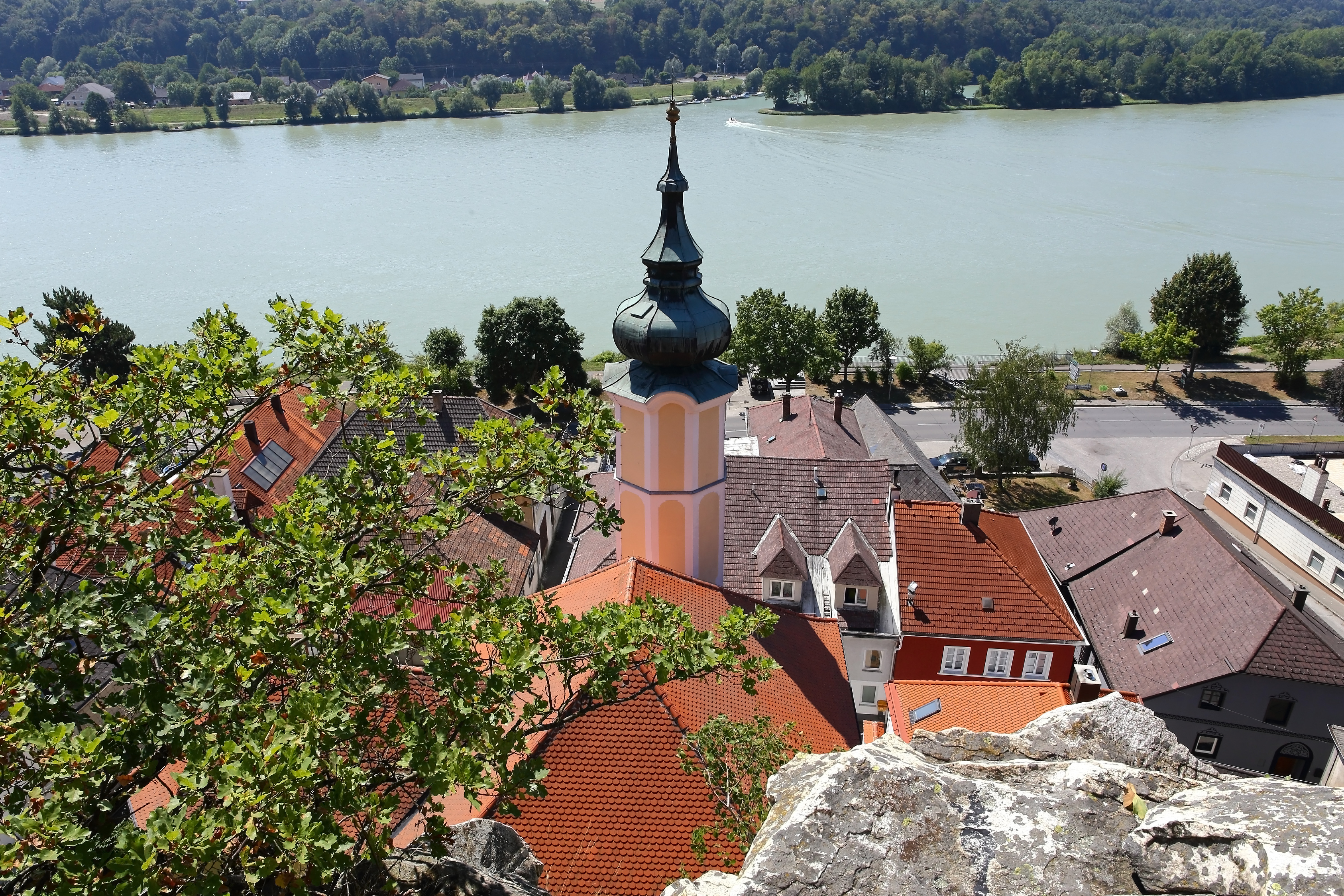 Die auf einem leicht erhöhten Platz im Westen des Ortes gelegene, durch eine Mauer im Süden von der alten Marktstraße getrennte und im Norden von einer steil aufragenden Felswand hinterfangene Pfarrkirche hl. Martin hat ein breites, kurzes Langhaus des 19. Jahrhunderts mit gotischem Chor und Südturm.